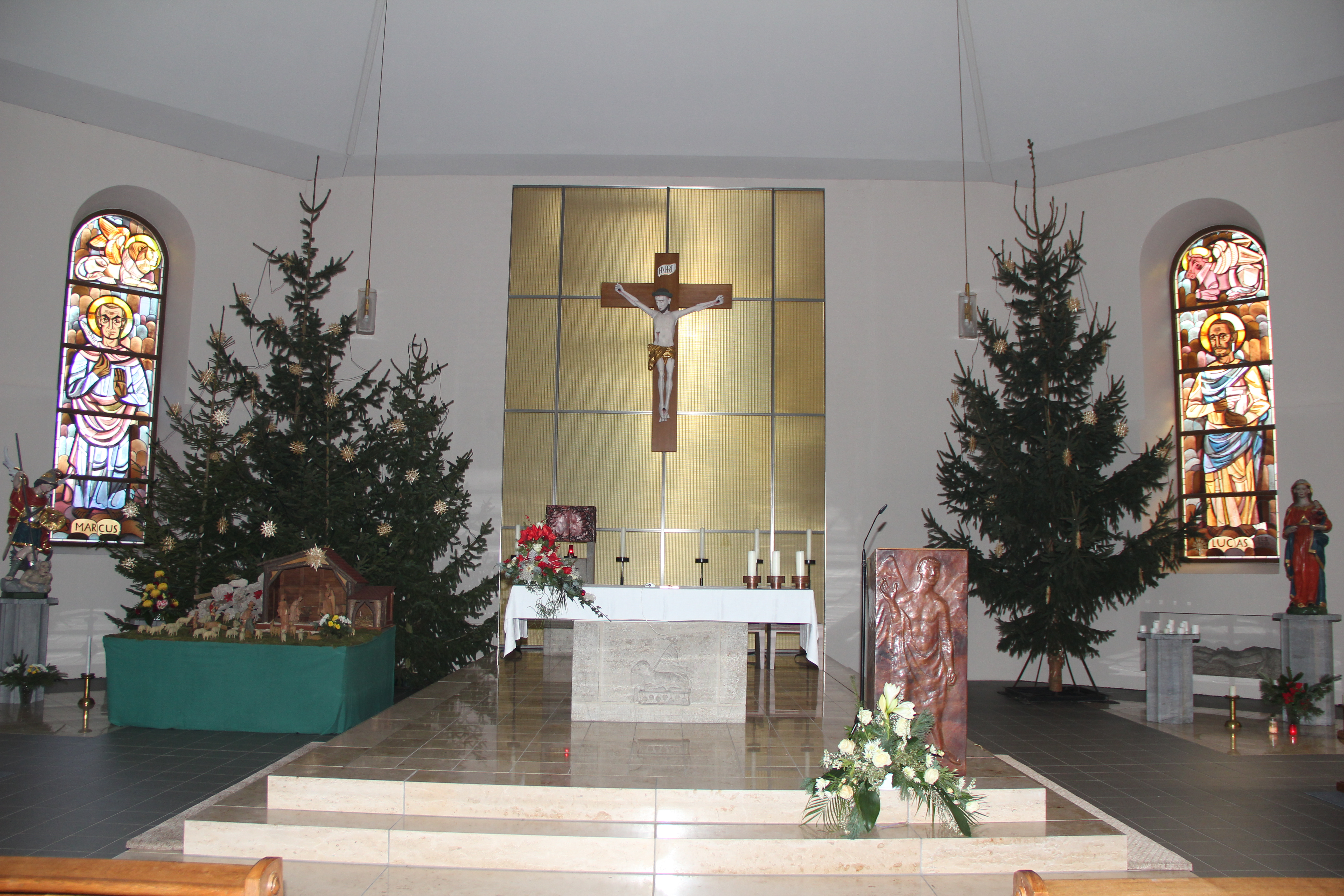 Innenansicht der Kirche St. Michael in Weißenborn